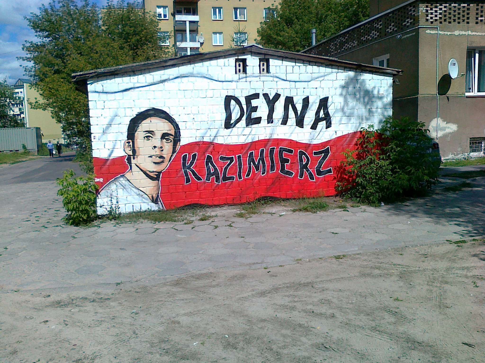 Mural depicts Deyna, Bielany district, Warsaw, Poland